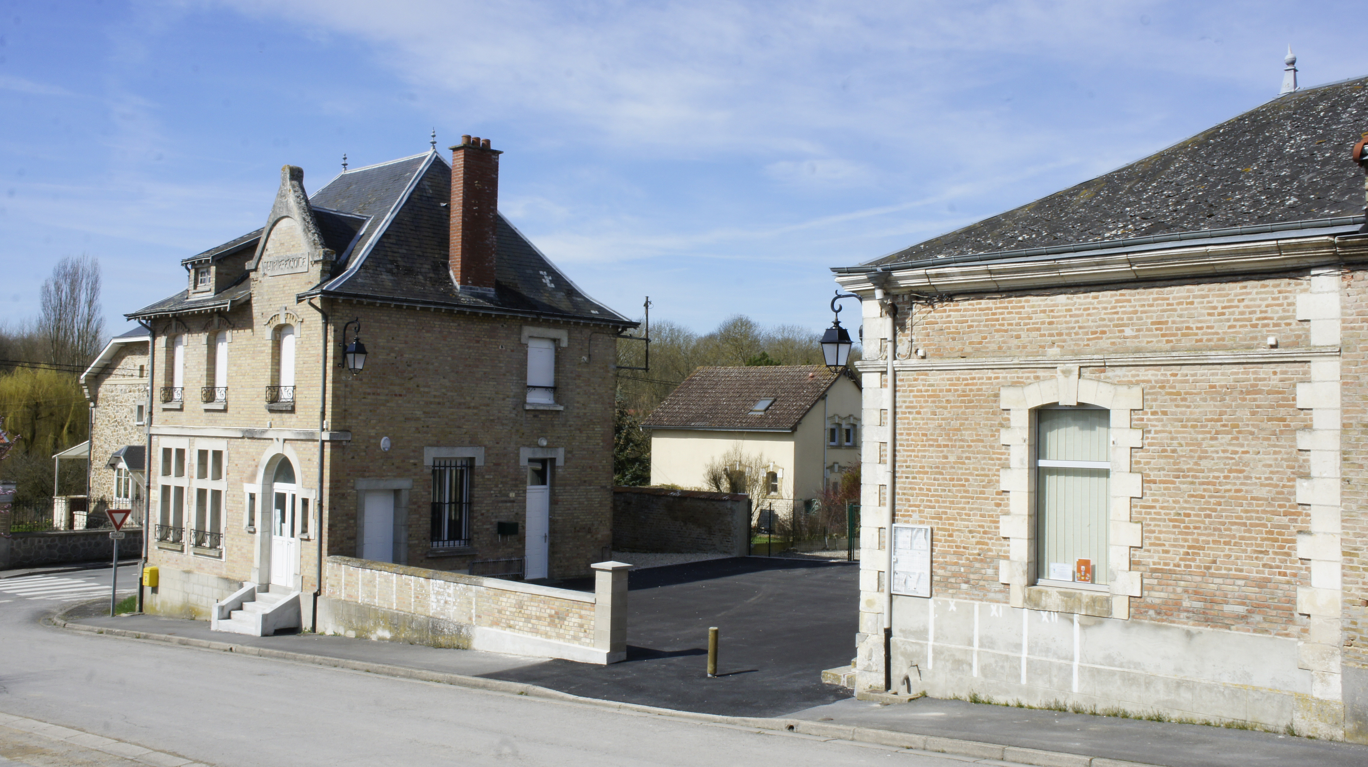 Mairie dans le village d'Alaincourt .